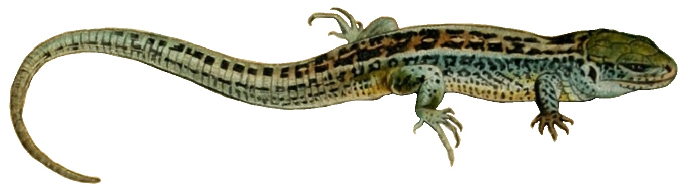 Lacerta agilis